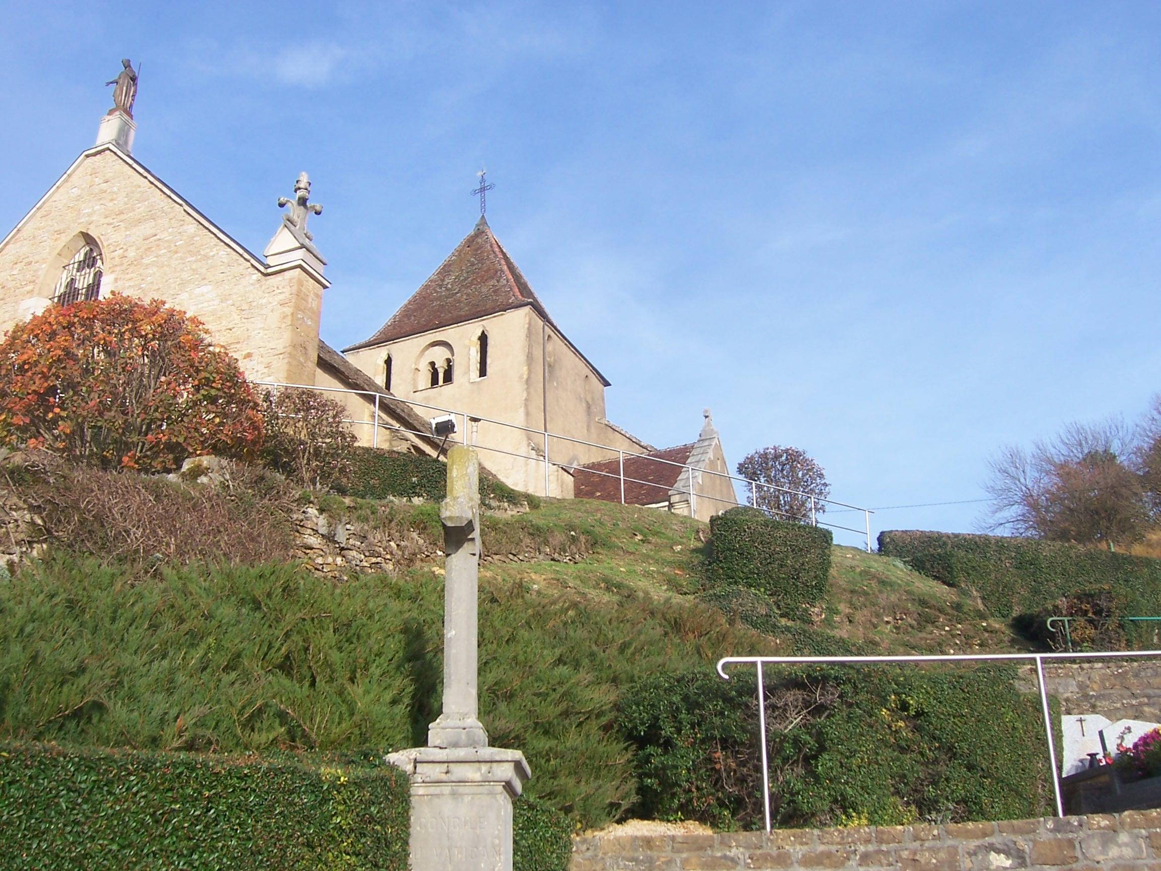 Eglise de Champagnat